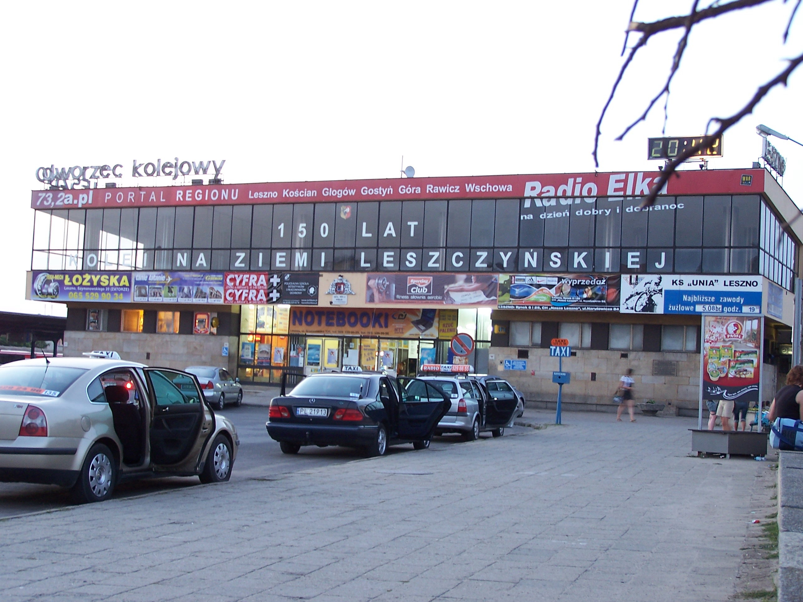 Polska, woj. wielkopolskie, Leszno, budynek dworca PKP, oddany do użytku w 1971 r. w miejsce rozebranego z XIX w.